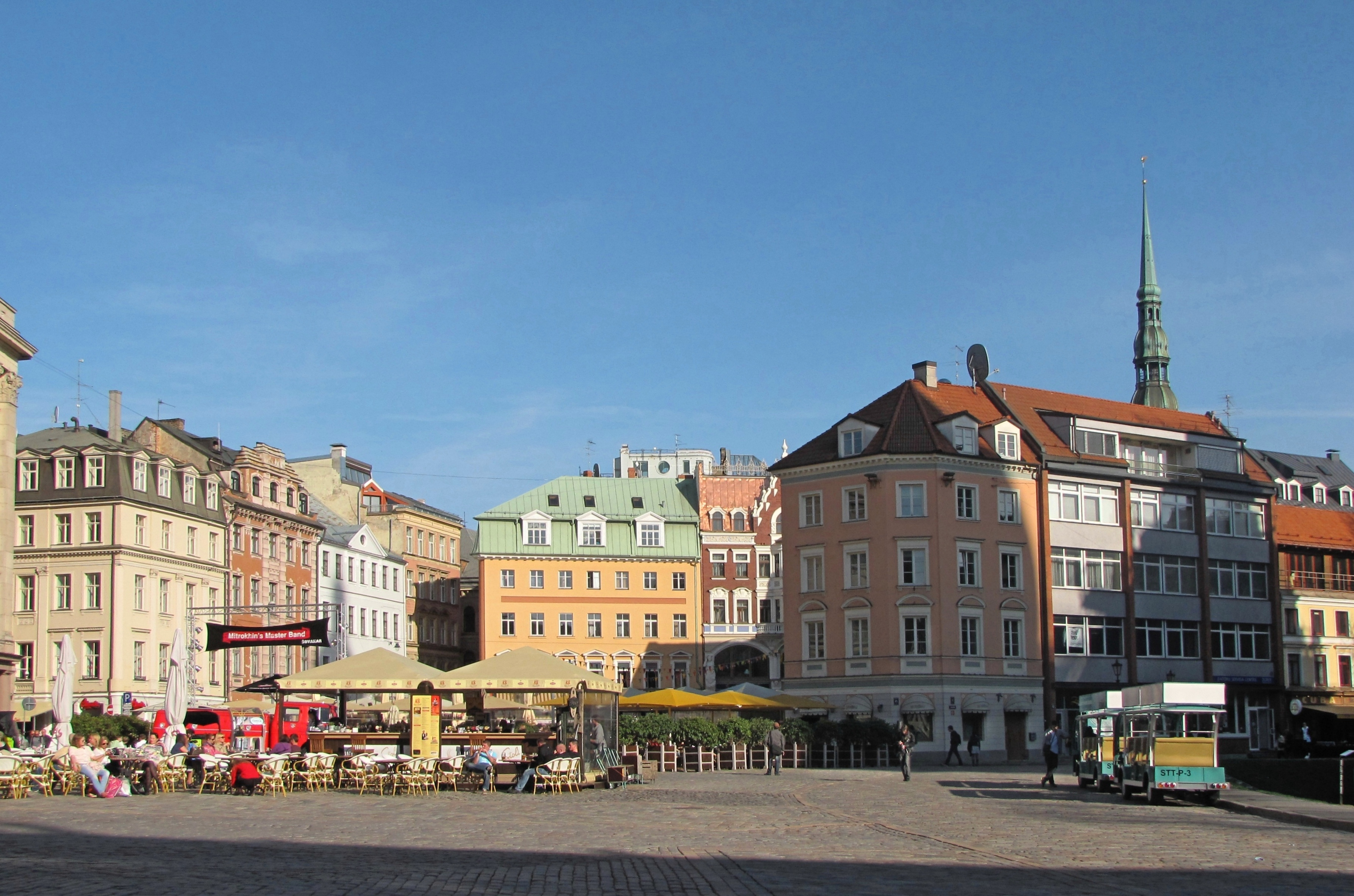 Домская площадь.